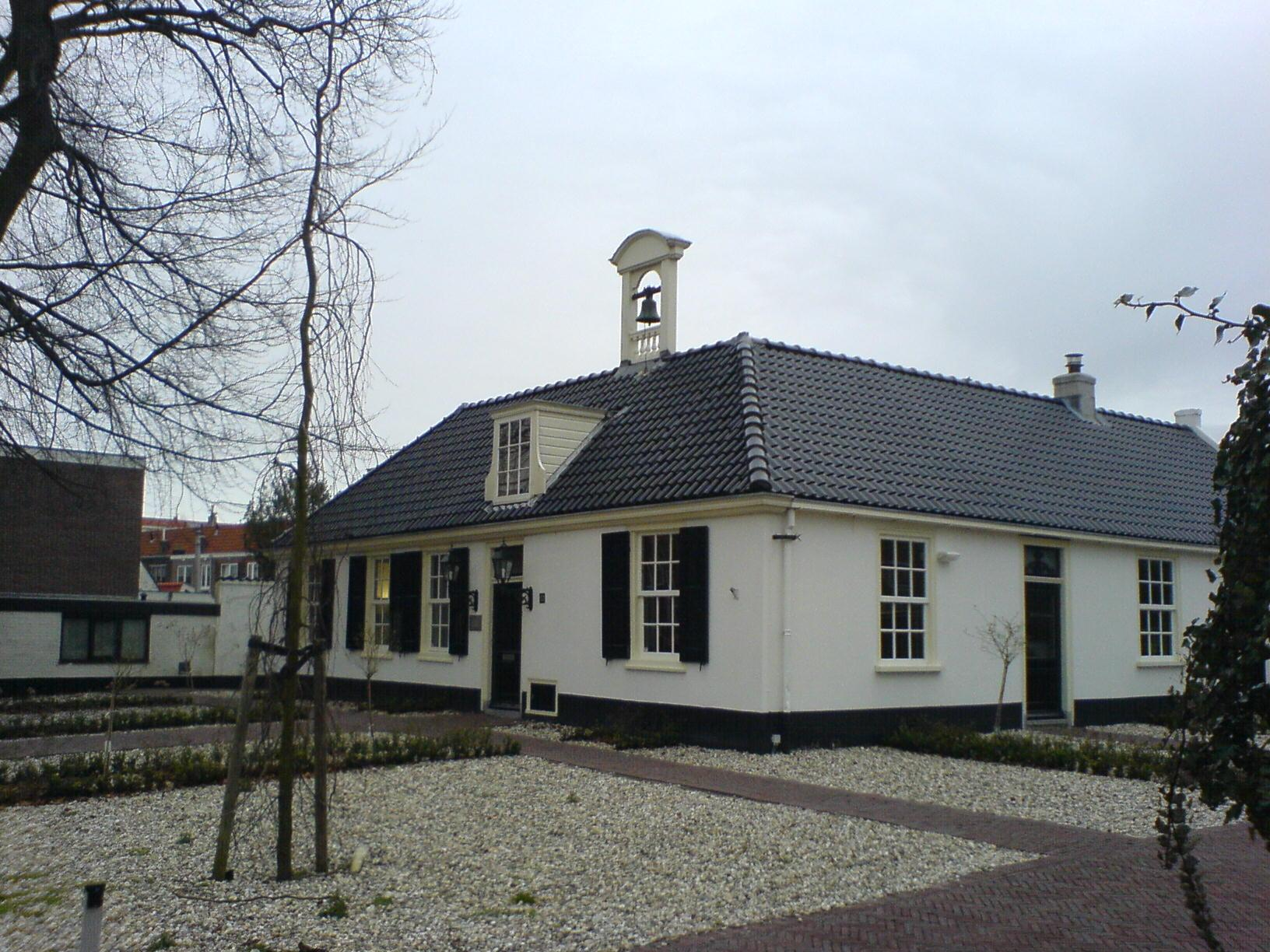 Schoterrechthuis 27-2-2006